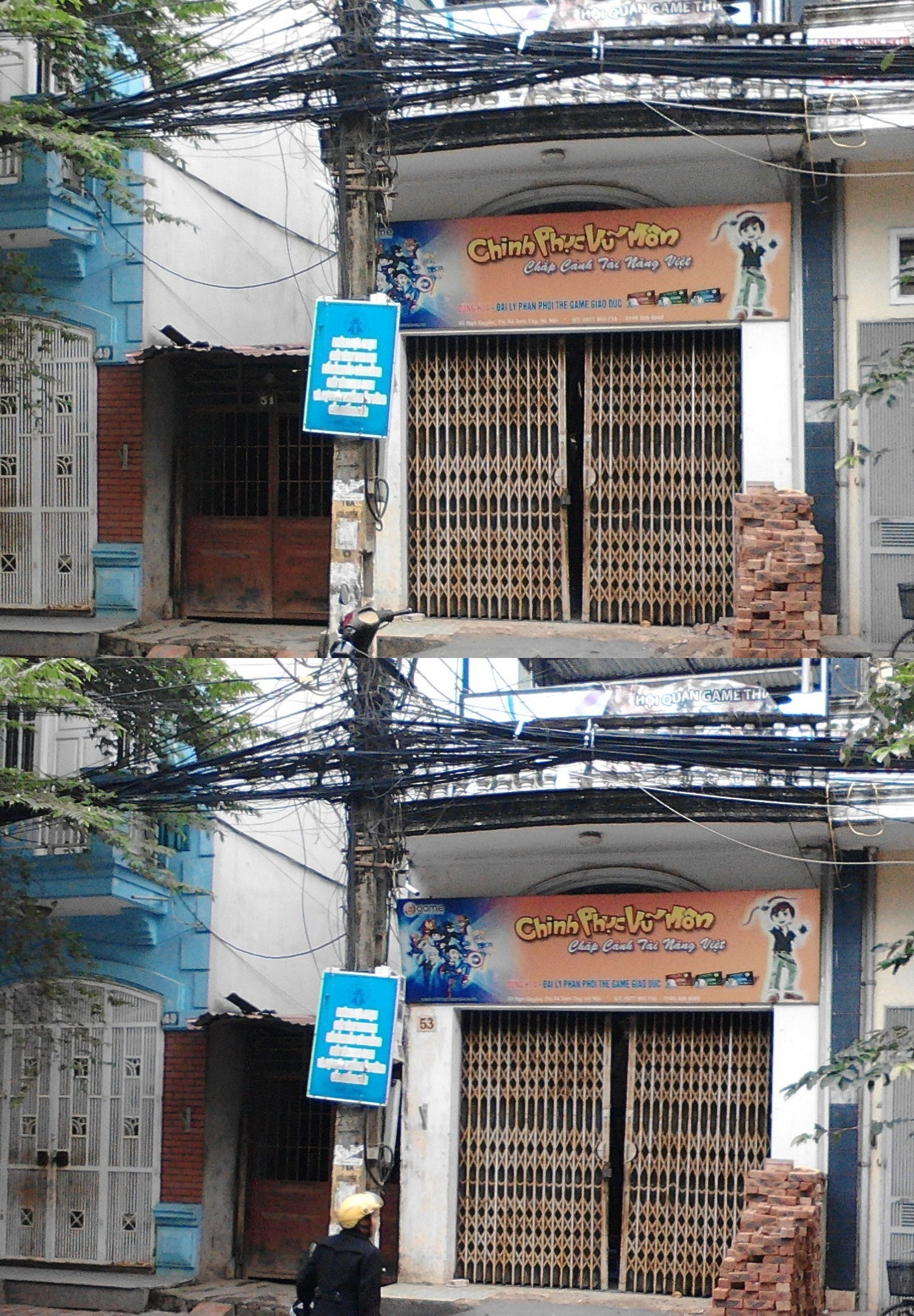 Mặt trước mảnh đất trên có các căn nhà số 51 và 53 phố Ngô Quyền phường Ngô Quyền thị xã Sơn Tây thành phố Hà Nội, nơi mà đầu thế kỷ 20 từng là tòa nhà của ông nội ông Nguyễn Cao Kỳ là cụ Nguyễn Cao Côn. Hiên nay tại căn nhà số 51, trong ngõ có người cháu gái con anh họ của ông Kỳ đang sống.